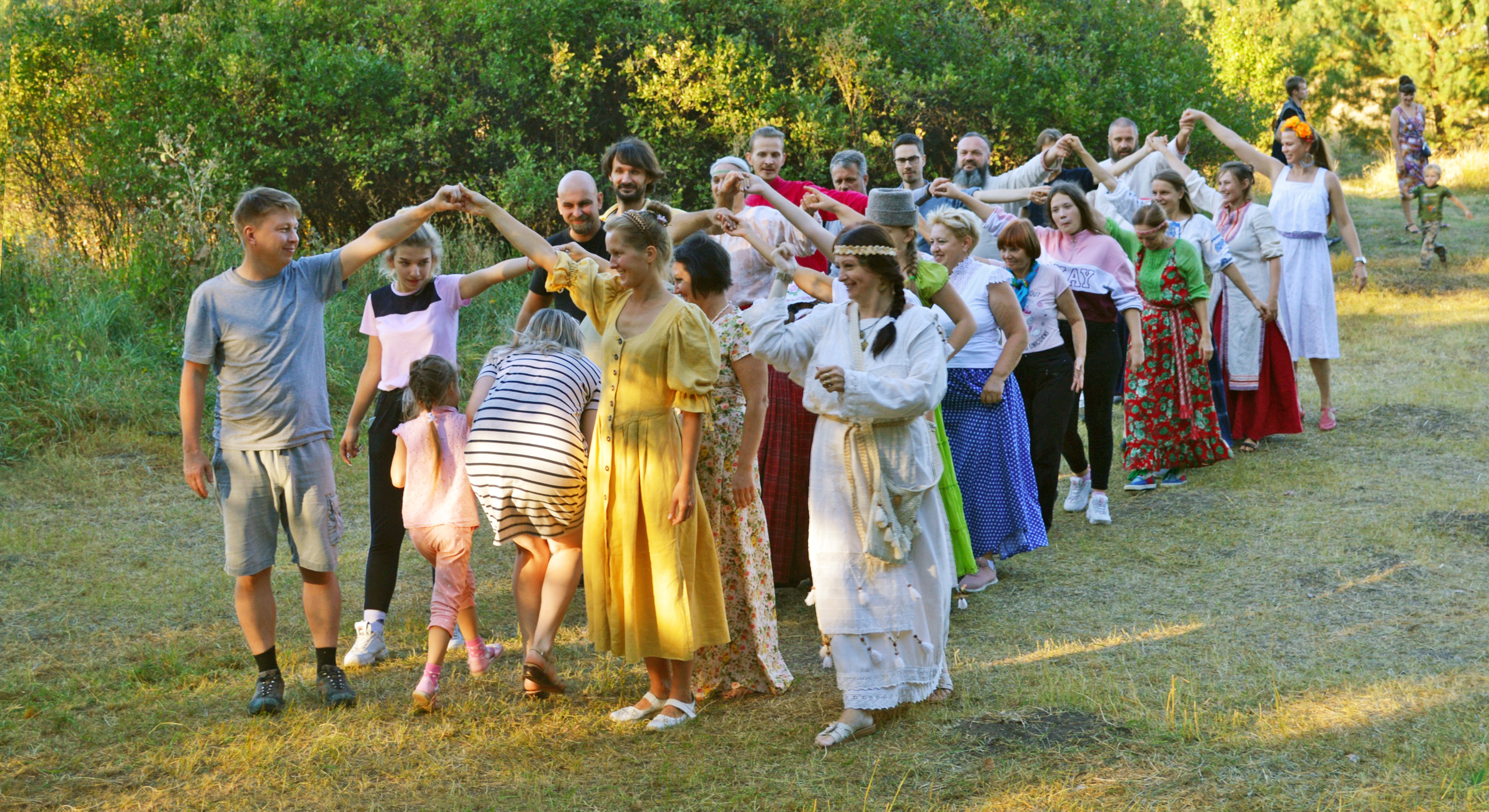 Праздник встречи осени (Осенины) в родовом экопоселении «Кореньские родники». Белгородская область, 2018.